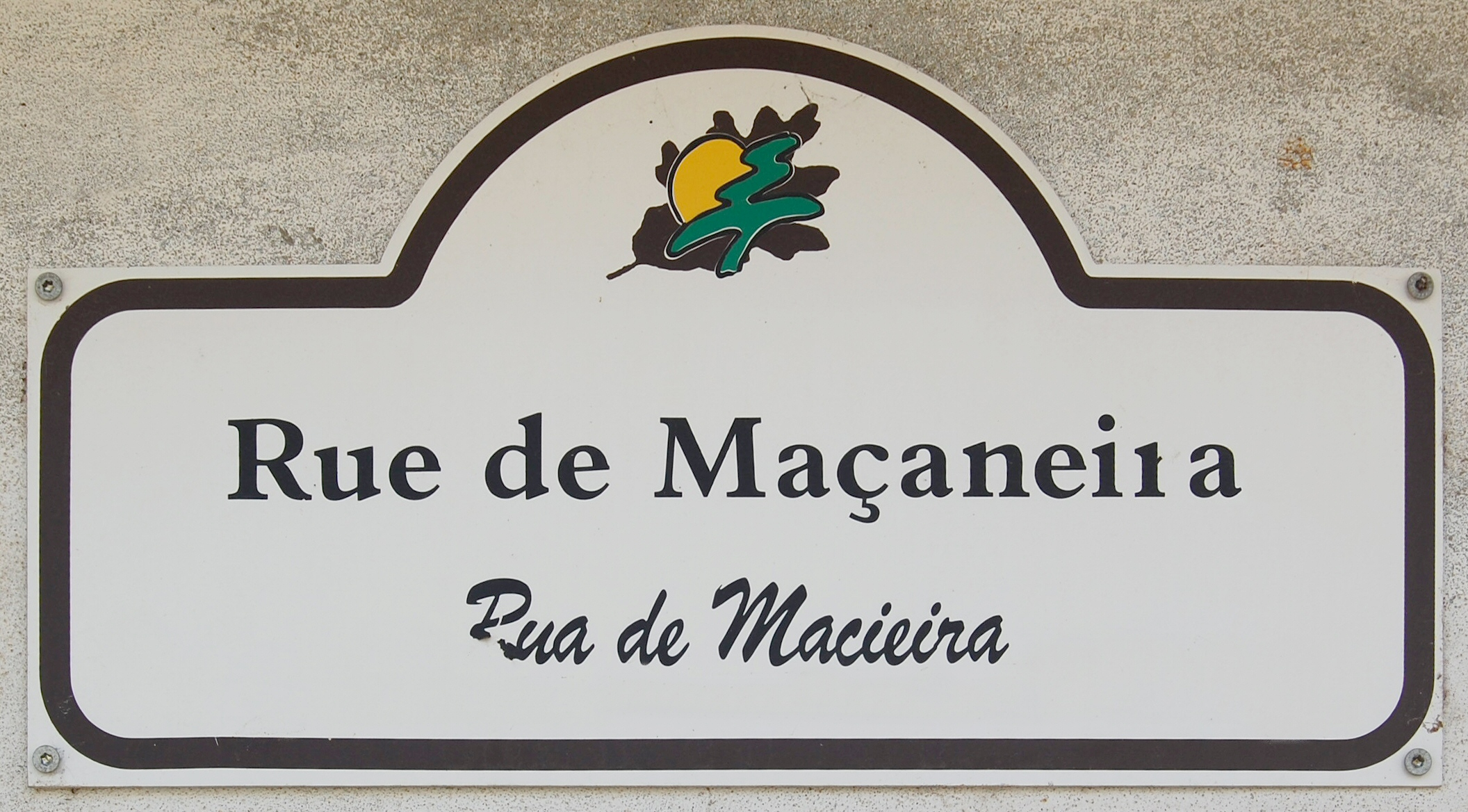 Placa de identificação de rua em mirandês na aldeia de Genísio (Miranda do Douro, Portugal.)